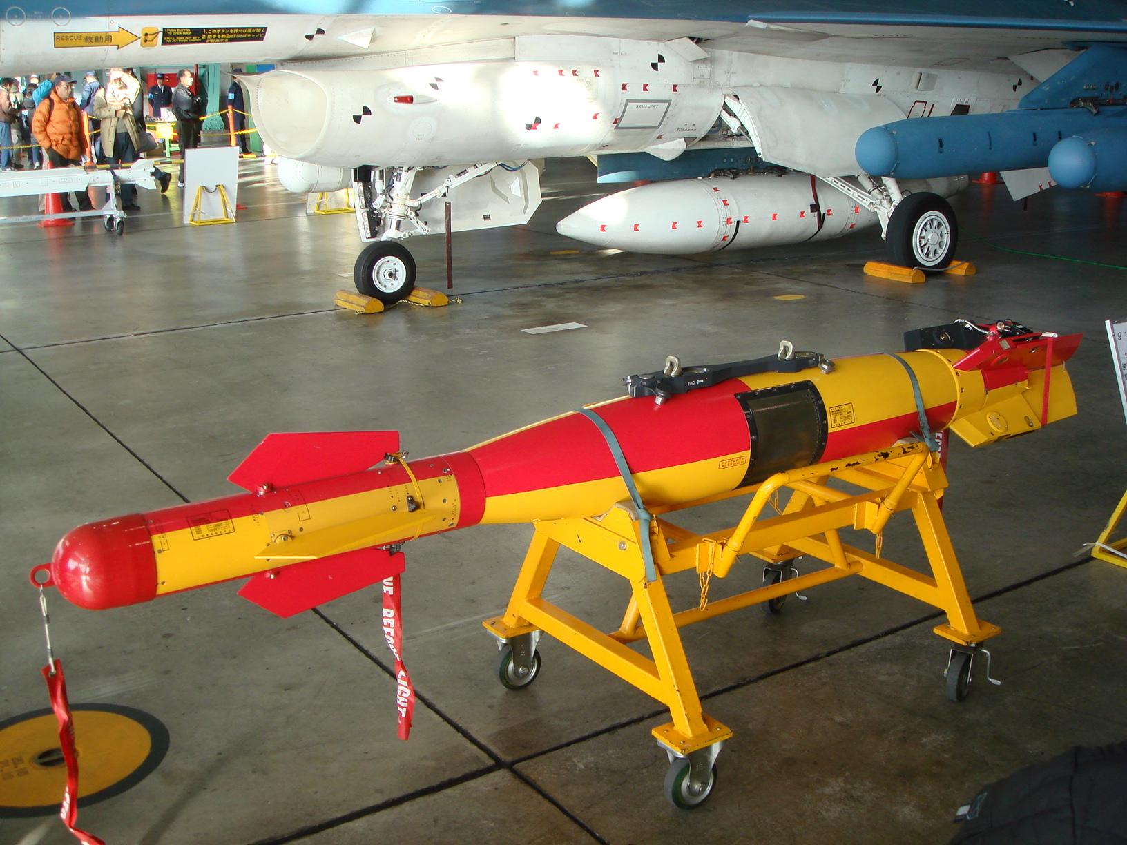 航空自衛隊 91式爆弾用誘導装置（Mk.82用、赤黄）。2008年11月30日 航空自衛隊岐阜基地にて。